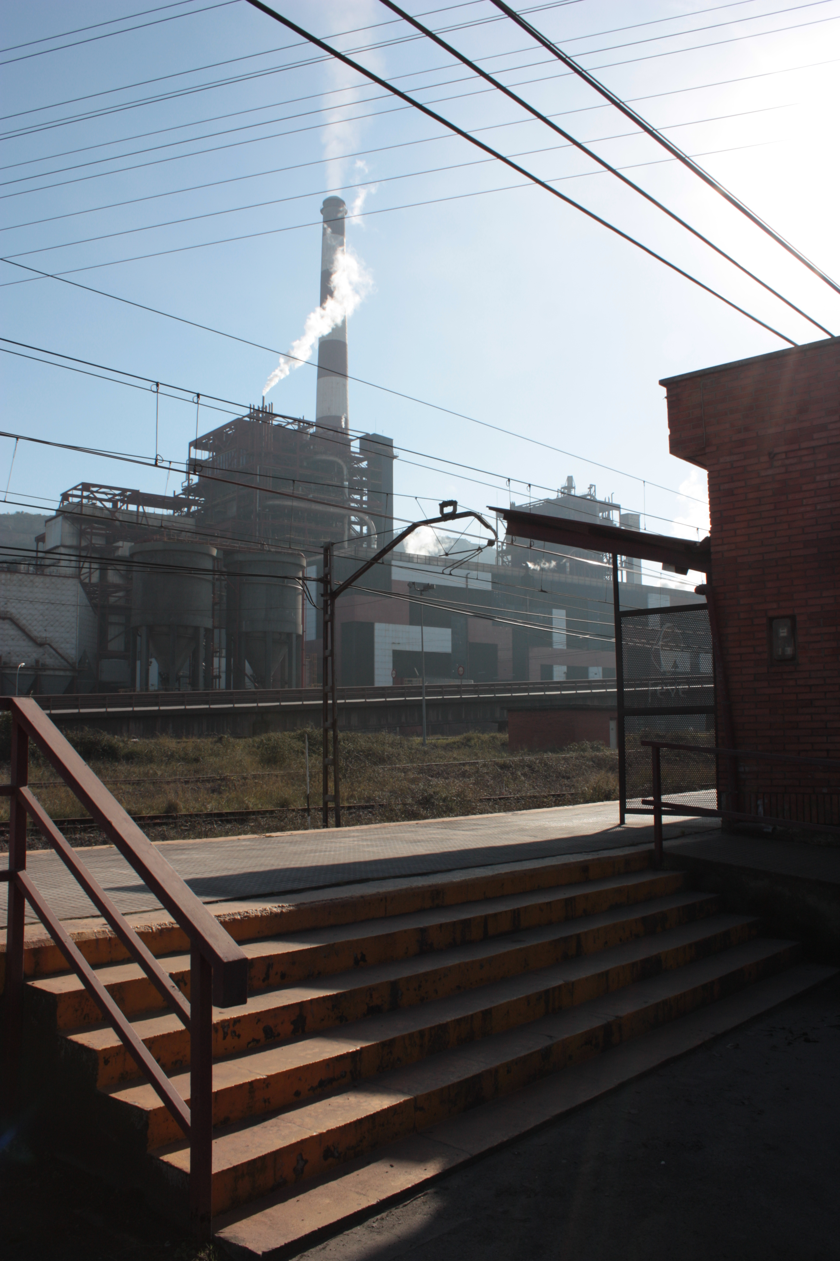 Estación de Aboño